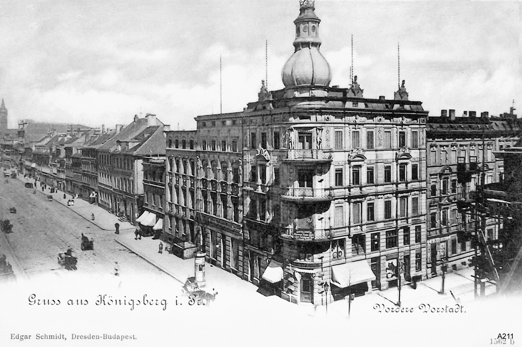 Königsberg